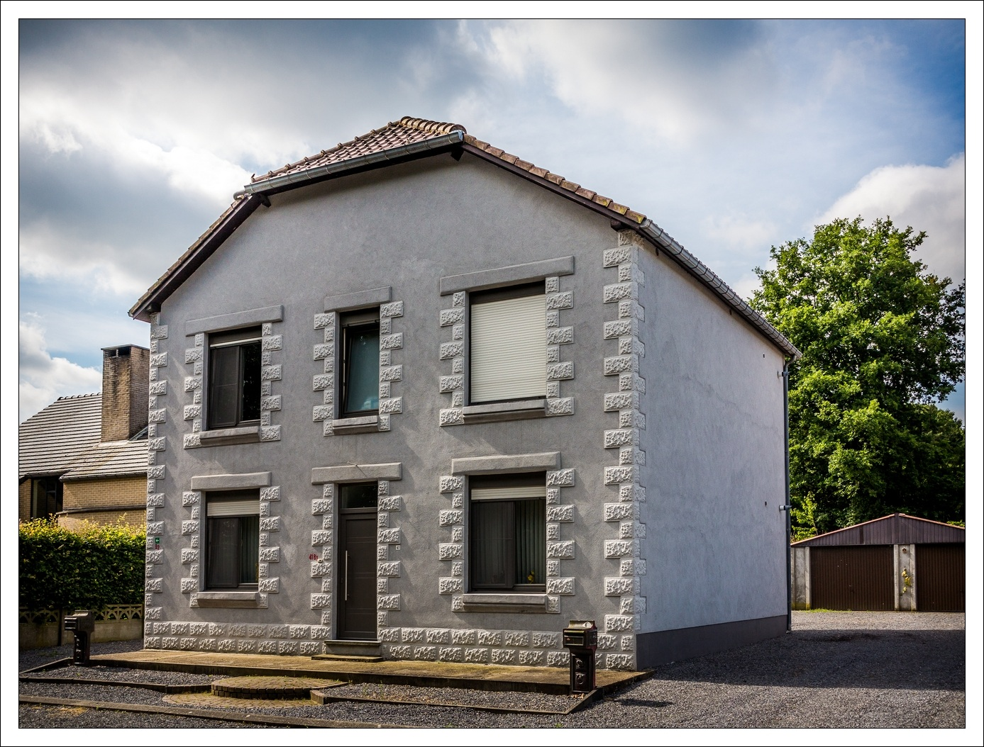 Het enig overgebleven huis van de Cité Cockerill in As, Herengracht 41